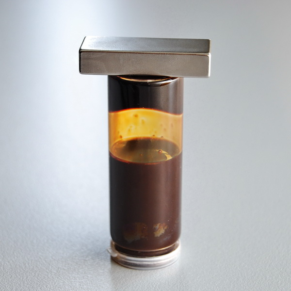 Superparamagnetische Flüssigkeit; Eisenoxidnanopartikel in wässriger Suspension zur Verwendung in der Thermo-Tumortherapie